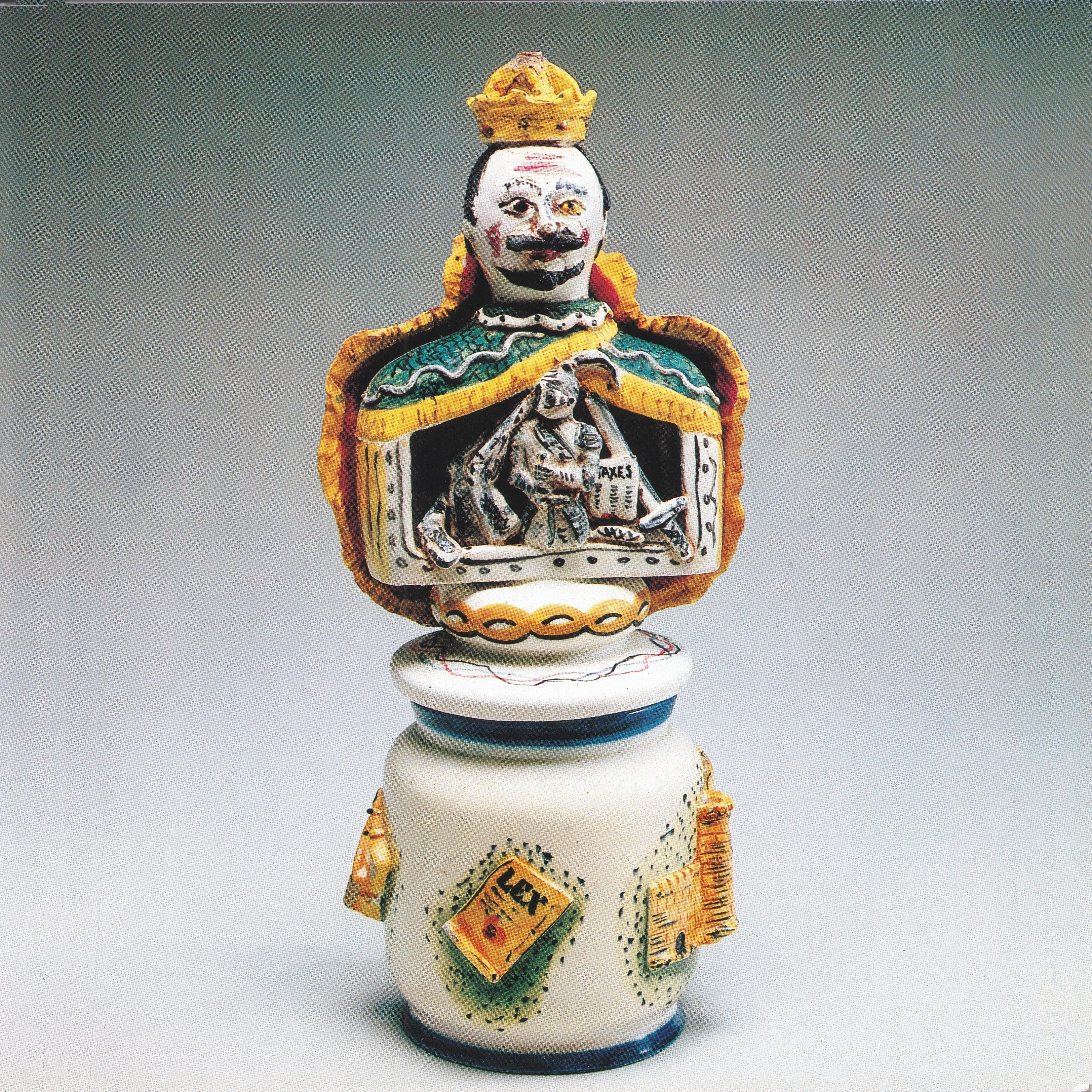 Vaso in terraglia con coperchio antropomorfo con applicazioni a rilievo e a tuttotondo. Decorazione policroma - cm 44,5 x 19 x 17. Foto per gentile concessione del Comune di Nove, 11/3/2013, Prot. n. 0002470, tratta dal volume "Andrea Parini - Ceramiche 1935 - 1970", Neri Pozza Editore, 1983 - Copyright Comune di Nove